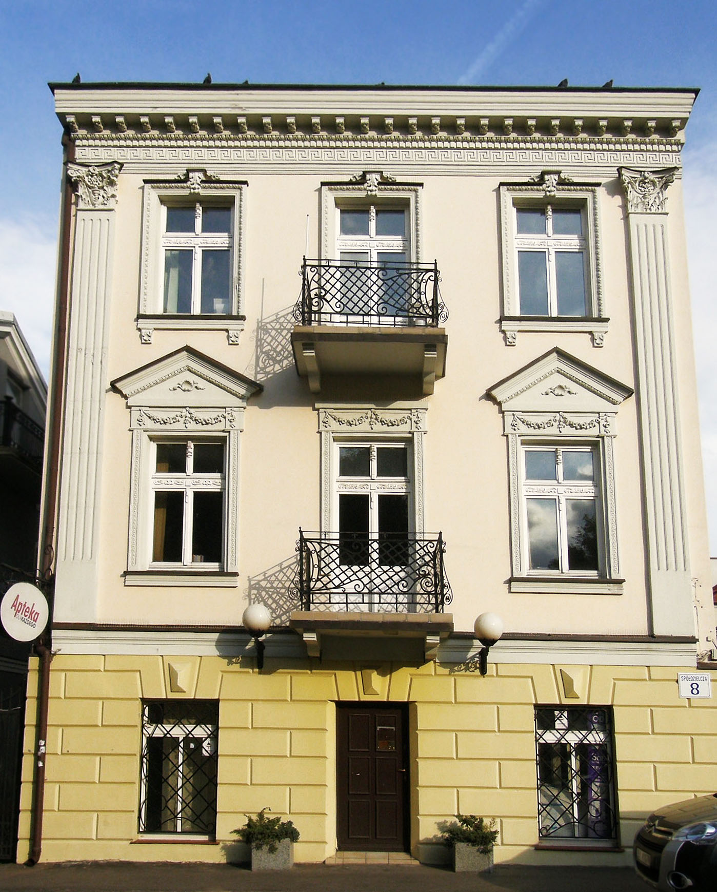 Białystok, ul. Spółdzielcza 8 - kamienica (zabytek nr 426 z 15.02.1979)